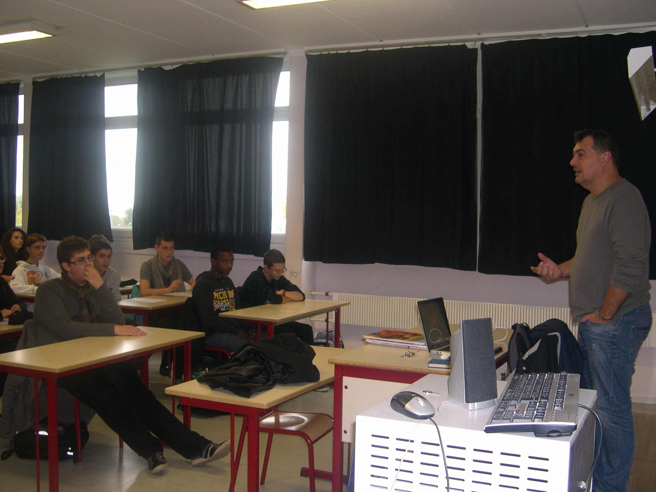 Venue de J. Alessandra ay lycée St Exupery de Fameck dans le cadre du festival du film arabe de Fameck